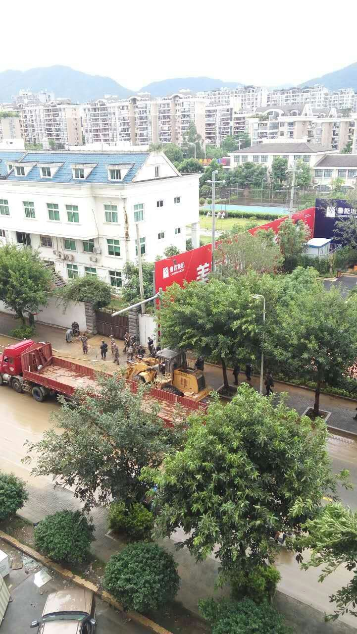 中文（中国大陆）: 2016年台风莫兰蒂登陆后，福州相关单位组织清洗城内路面。